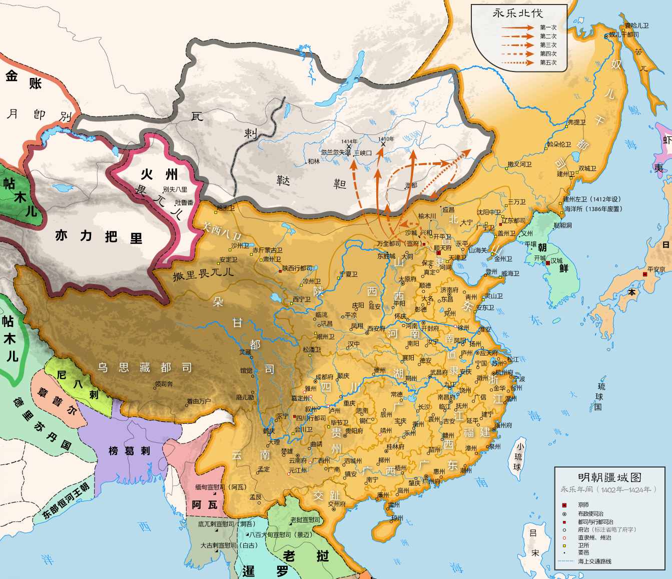 明朝